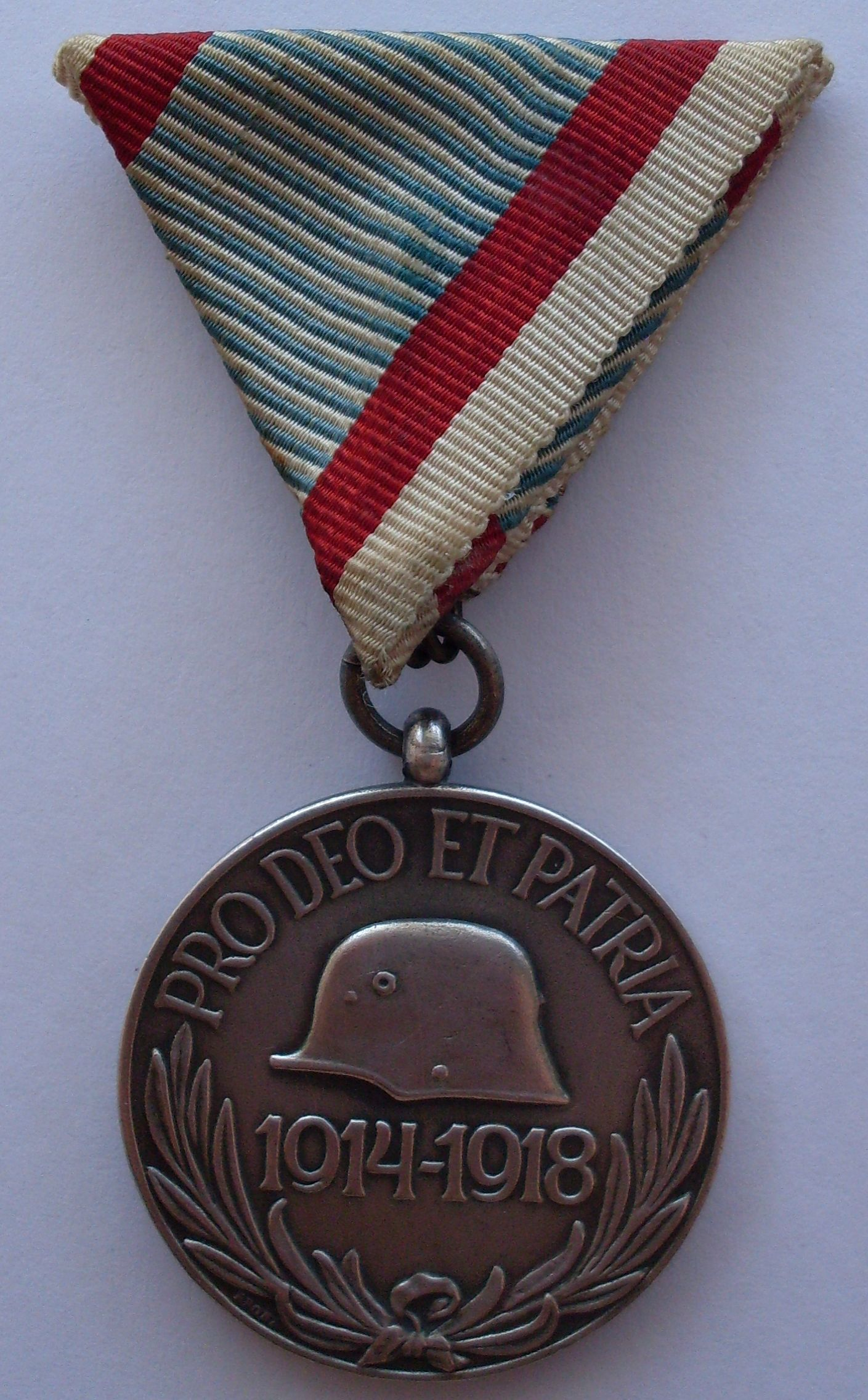 Rückseite der ungarischen Weltkriegs Erinnerungs Medaille